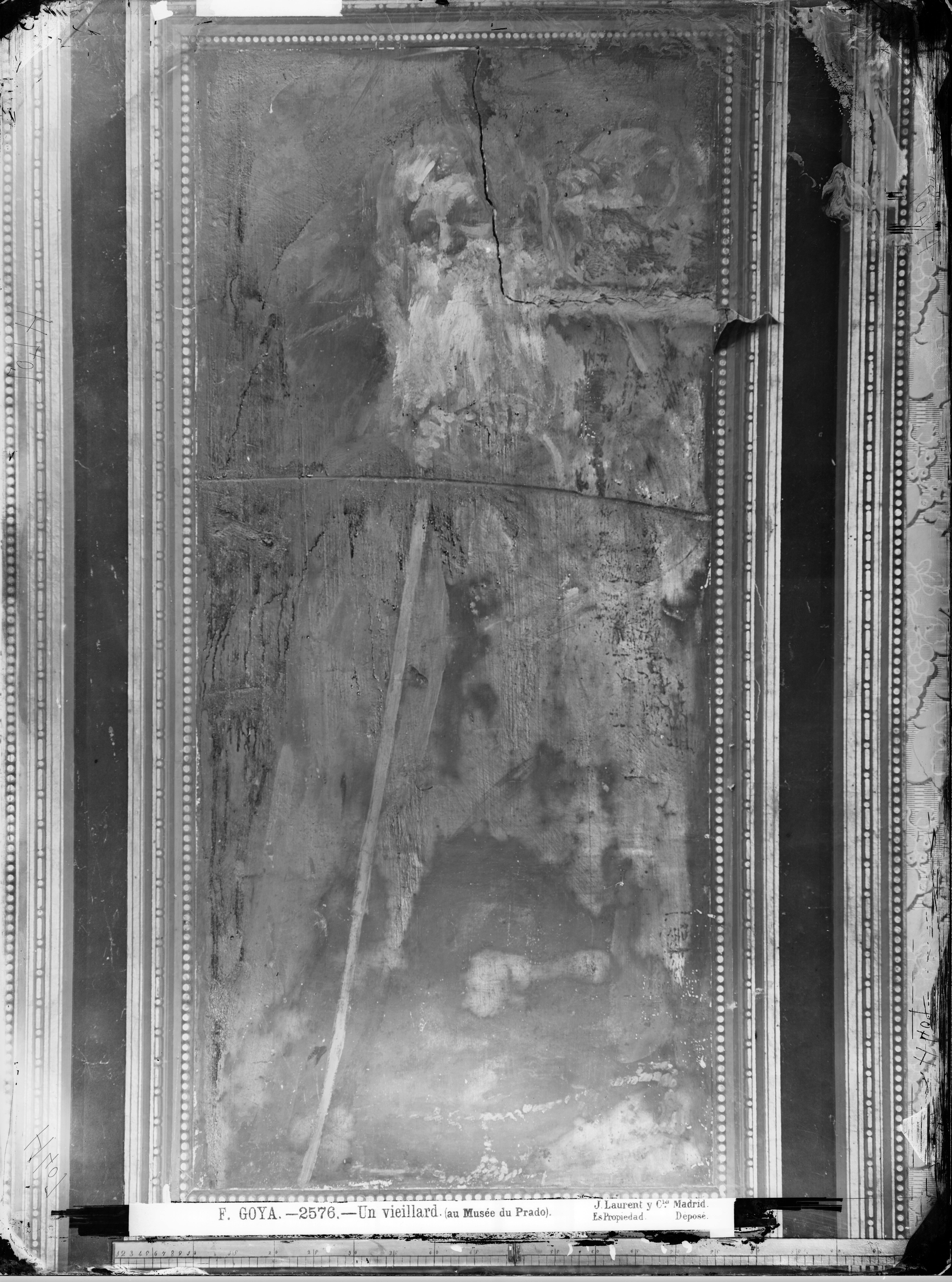 Fotografía de J. Laurent, año 1874, imagen positiva digital a partir del negativo de vidrio original con número de inventario moderno VN-08124, de la Fototeca del Instituto del Patrimonio Cultural de España (IPCE), en Madrid. La pintura "Dos viejos" aparece todavía en su pared de la casa de Goya. El rótulo Museo del Prado fue añadido al negativo posteriormente, tras la donación de la pintura (ya arrancada del muro) al Museo del Prado, por parte del barón de Erlanger en 1881. En la fotografía vemos grietas que atraviesan la obra. El marco es de papel pintado. Esta obra se encontraba en un salón de la planta baja de la Quinta de Goya.